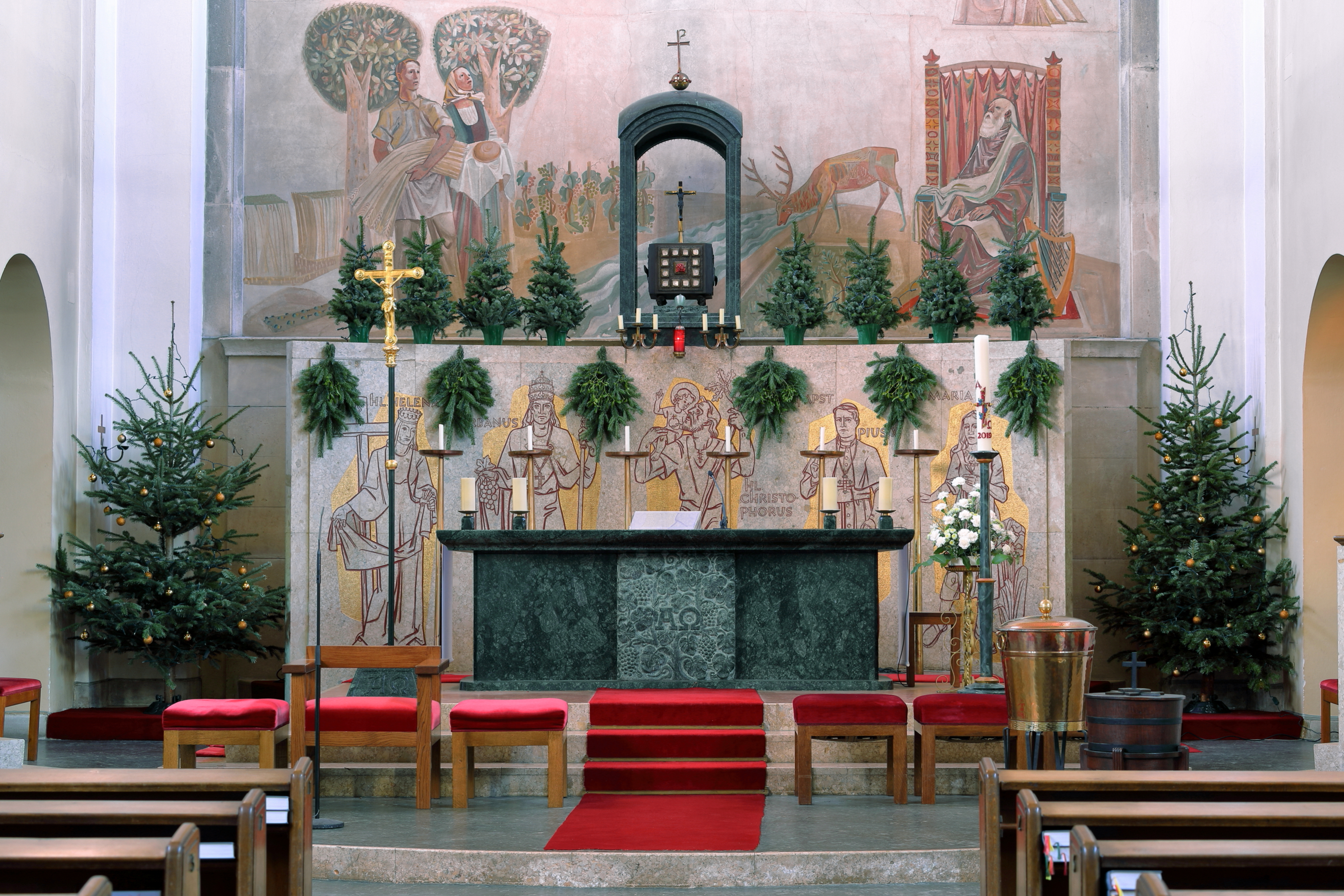 Heiligenwand hinter dem Altar der Pfarrkirche St. Christoph in der niederösterreichischen Stadtgemeinde Baden.Die Umrissgravuren auf Goldgrund stellen die hl. Helena (Patronin der Mutterpfarre), den hl. Urbanus (Patron der Winzer), den hl. Christophorus (Kirchenpatron), den hl. Papst Pius X. und die hl. Maria Goretti (beide Heilige des 20. Jahrhunderts) dar und wurden 1957 von dem Künstler Franz Kaulfersch geschaffen. Das Fresko dahinter an der Chorschlusswand ist ein Werk des Künstlers Rudolf Eisenmenger aus dem Jahr 1957 und den Tabernakel schuf der Bildhauer Viktor Hammer.